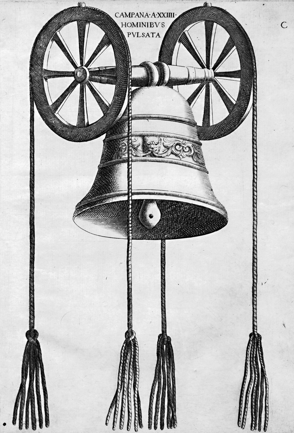 Campana a XXIIII hominibus pulsata (von 24 Menschen zu läutende Glocke), aus: Angelo Rocca: De campanis commentarius, Roma, Guillelmo Facciotti, 1612.